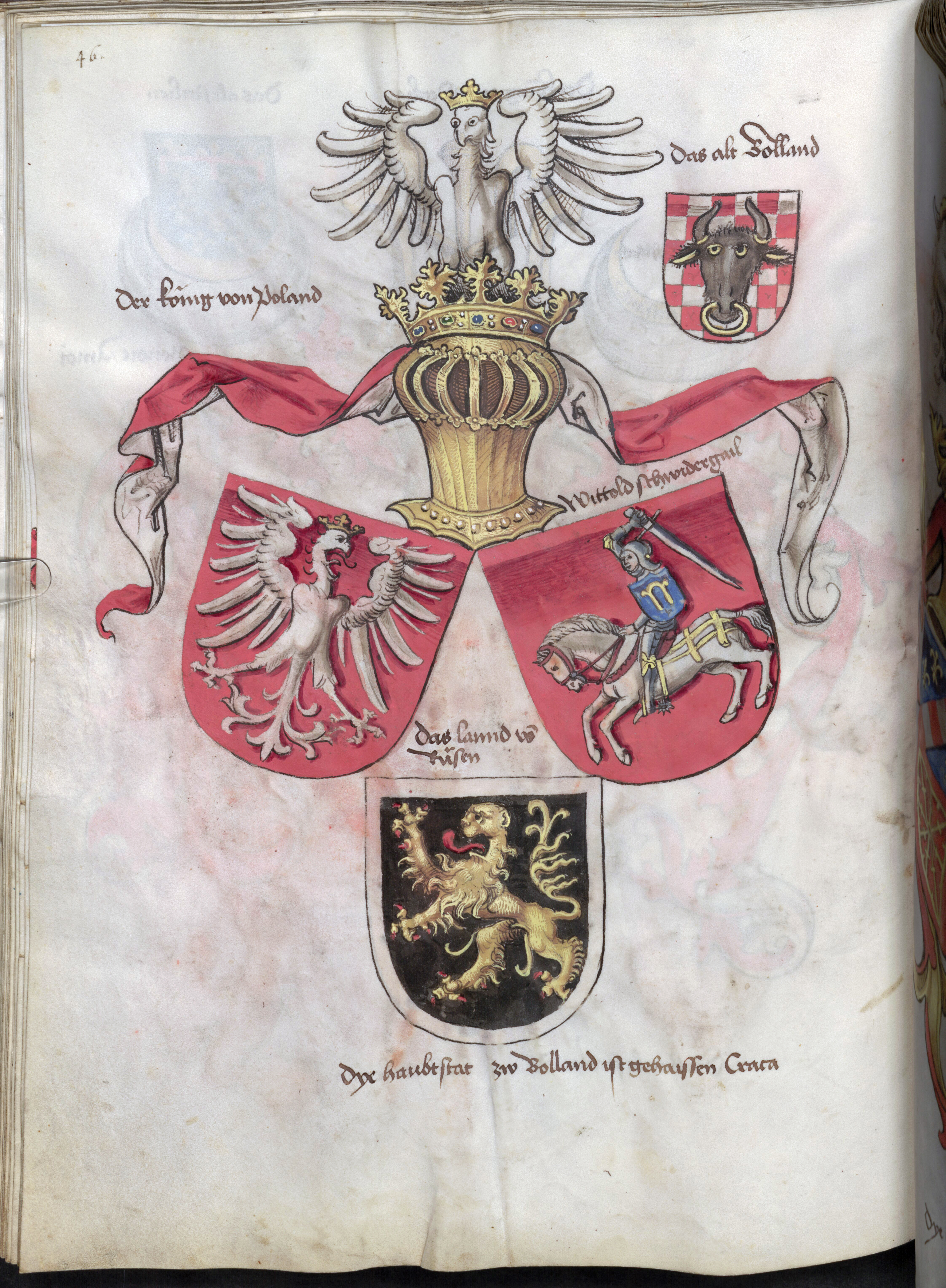 Беларуская (тарашкевіца): Герб Пагоня (Pahonia)